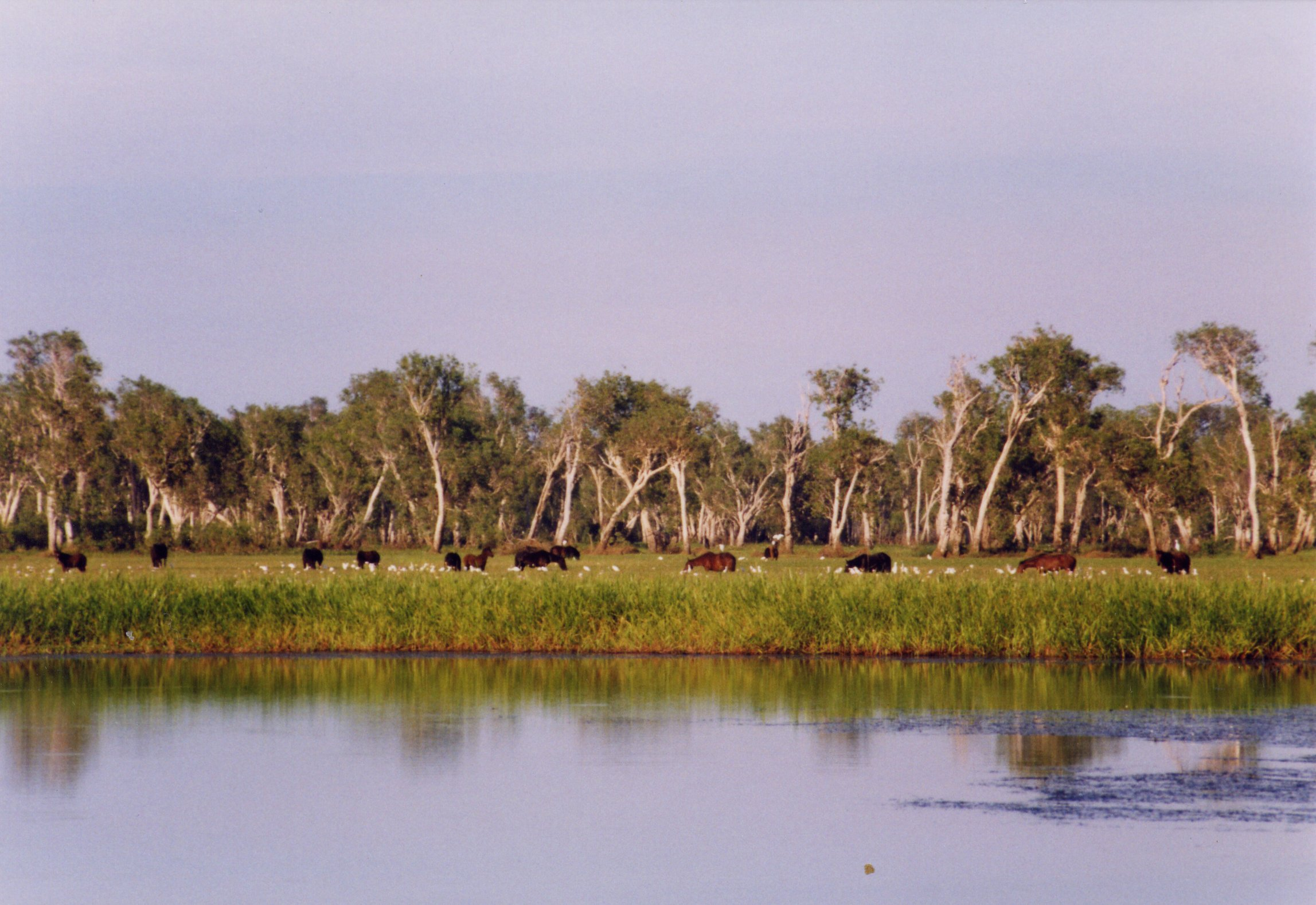 Brumbies, Yellow Water, Kakadu NP, NT